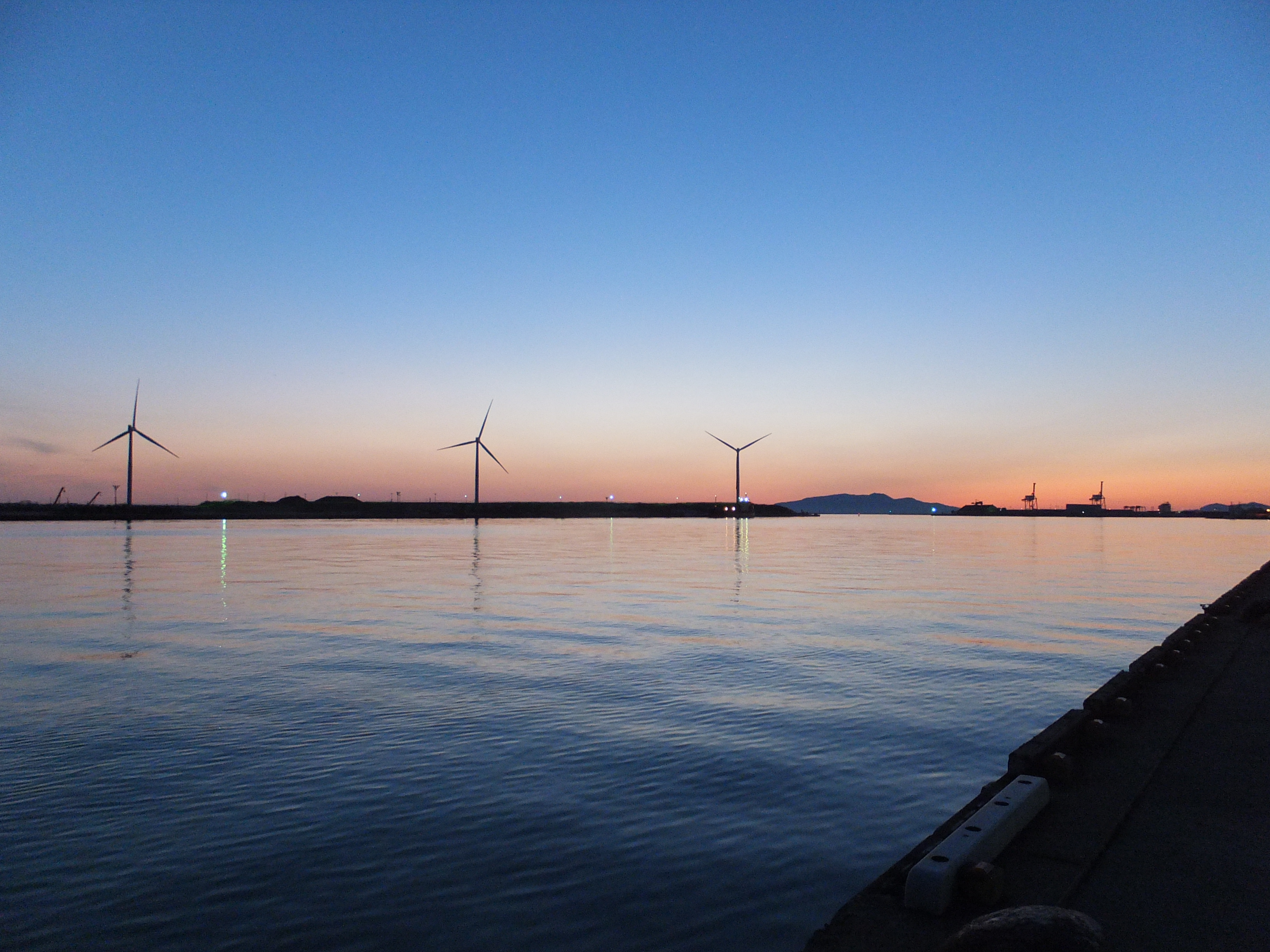 黄昏時の秋田港。港口の彼方に男鹿半島が見える。